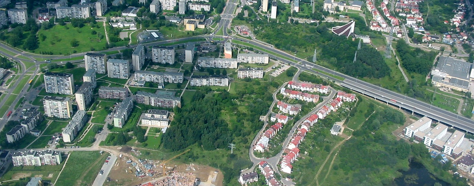 Gdańsk, dzielnica Piecki-Migowo / Morena / ul. Rakoczego. Zdjęcie lotnicze.